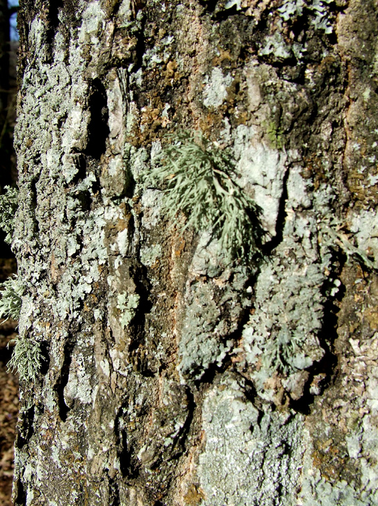 Grmičasti lišaji/Lecanorales